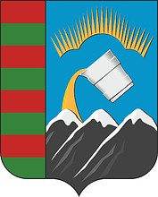 Герб Печенгского района (Мурманская область)